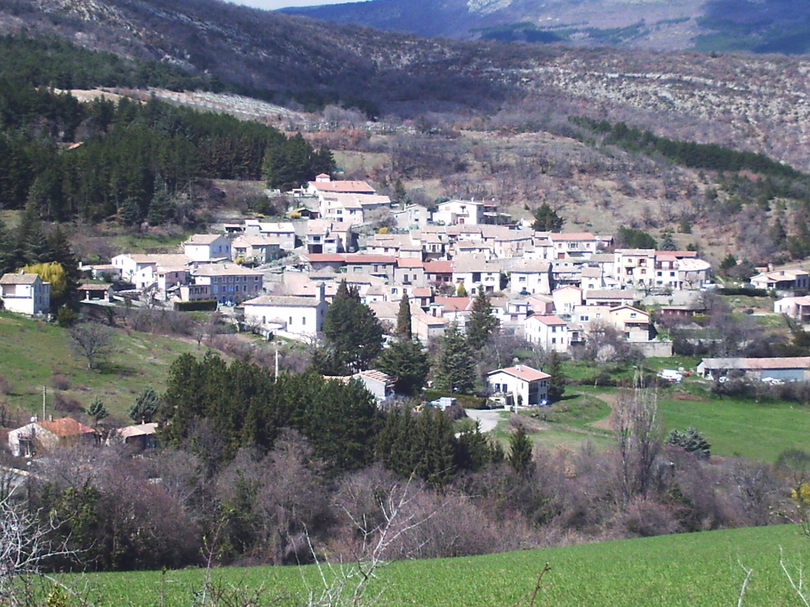 Vue du village d'Antonaves depuis Saint Jean